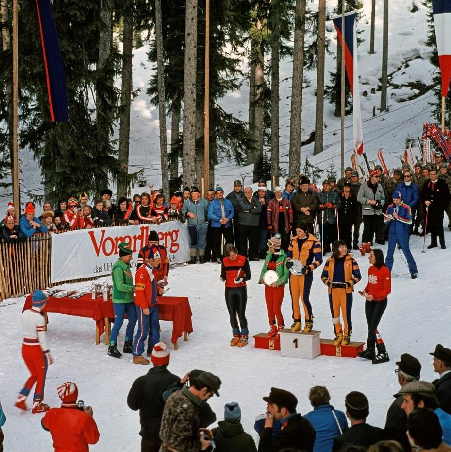 Siegerehrung bei der Abfahrt des Goldschlüsselrennens 1975: 1. Bernadette Zurbriggen, 2. Ingrid Gfölner, 3. Marie-Theres Nadig